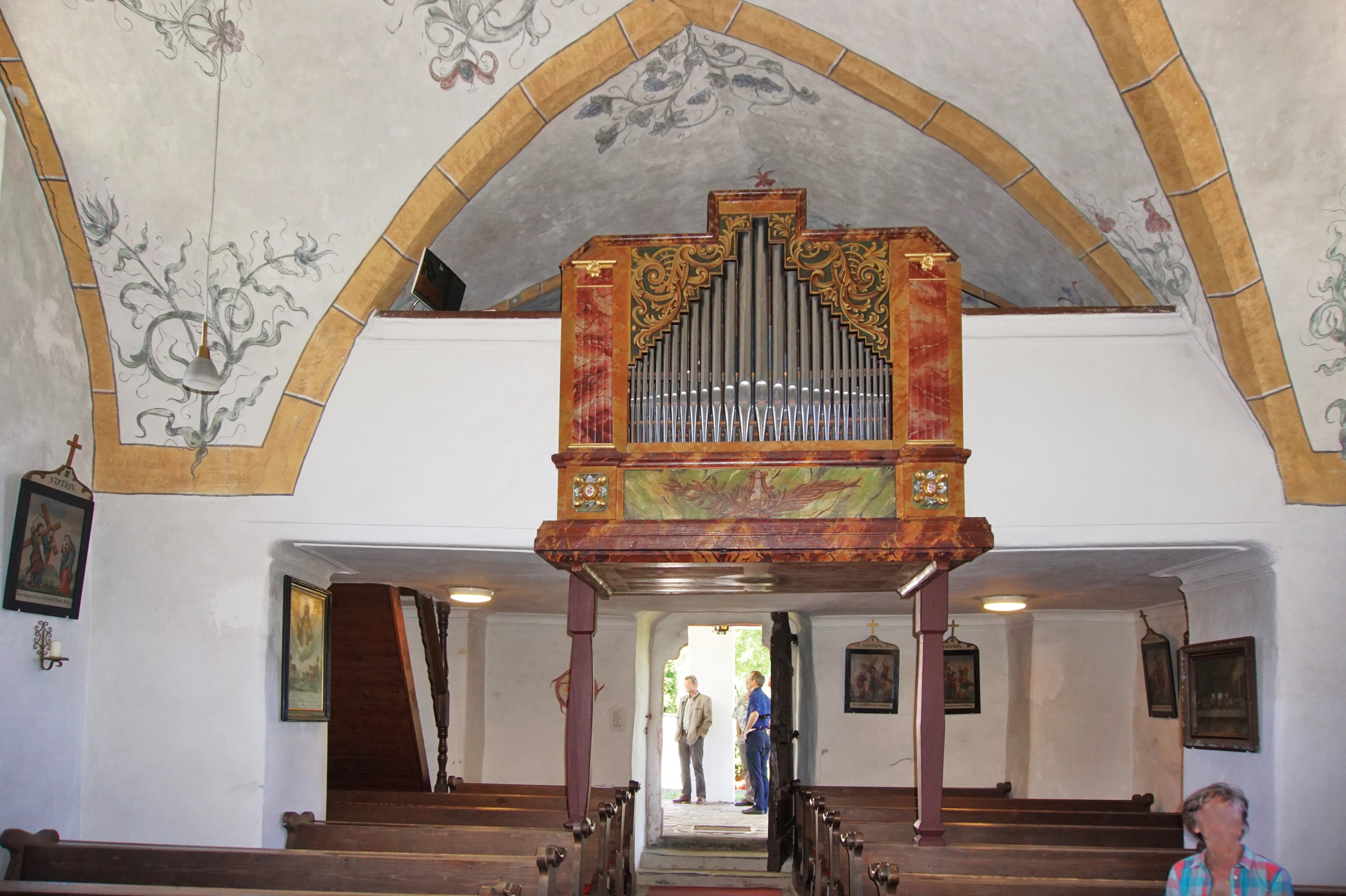 Orgelempore der kath. Filialkirche St. Martin (Feldkirchen in Kärnten)